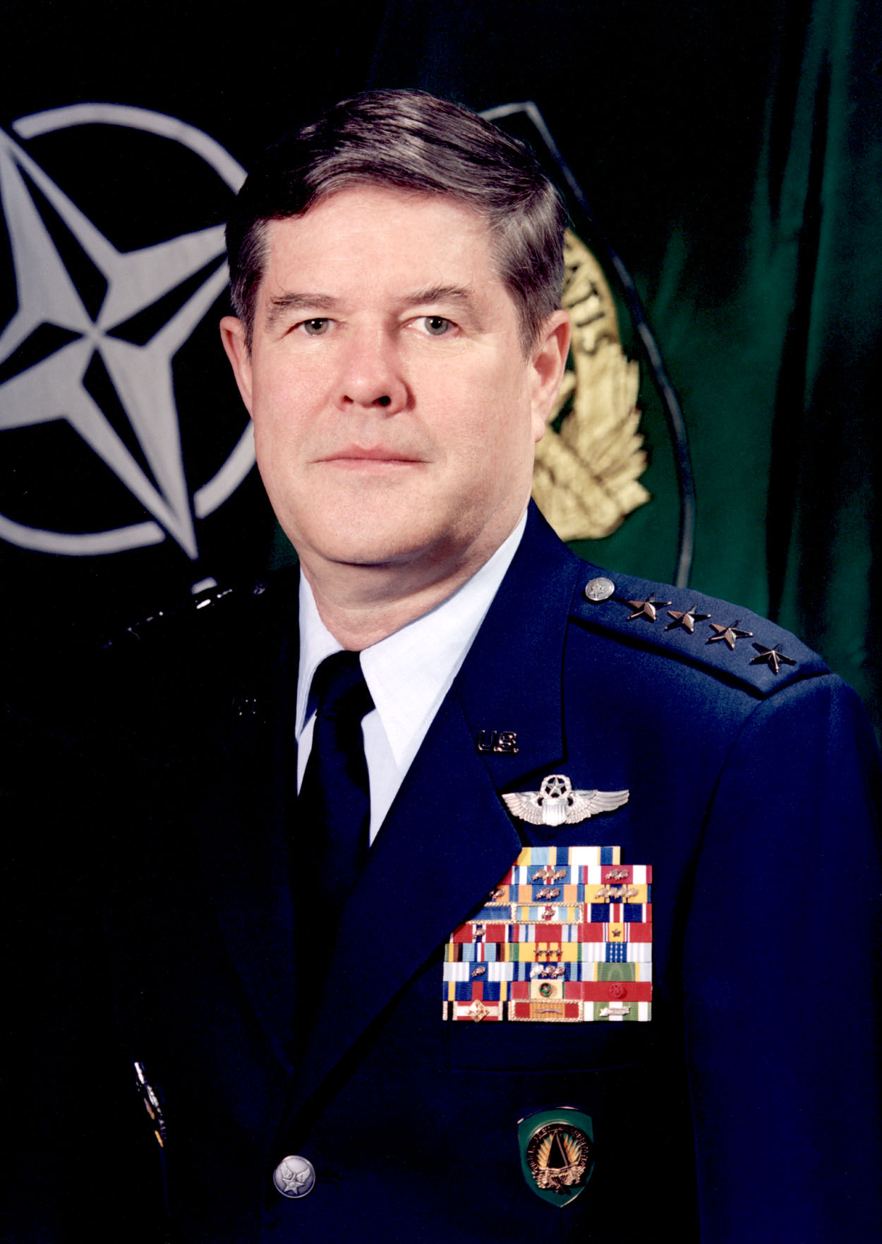 General Joseph Ralston, USAF.